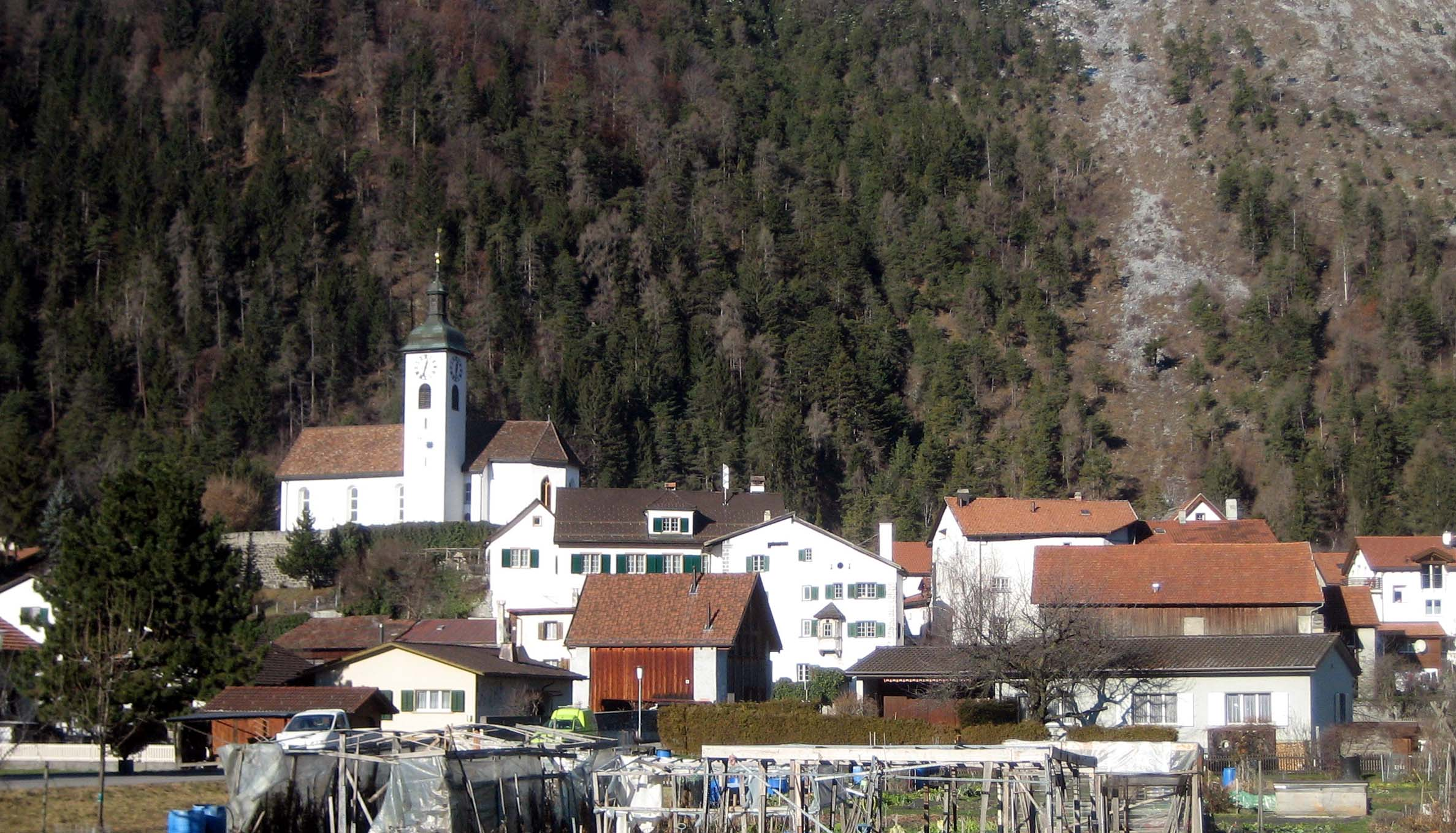 Felsberg GR